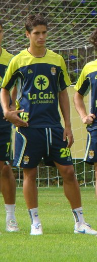 Sergio Suárez